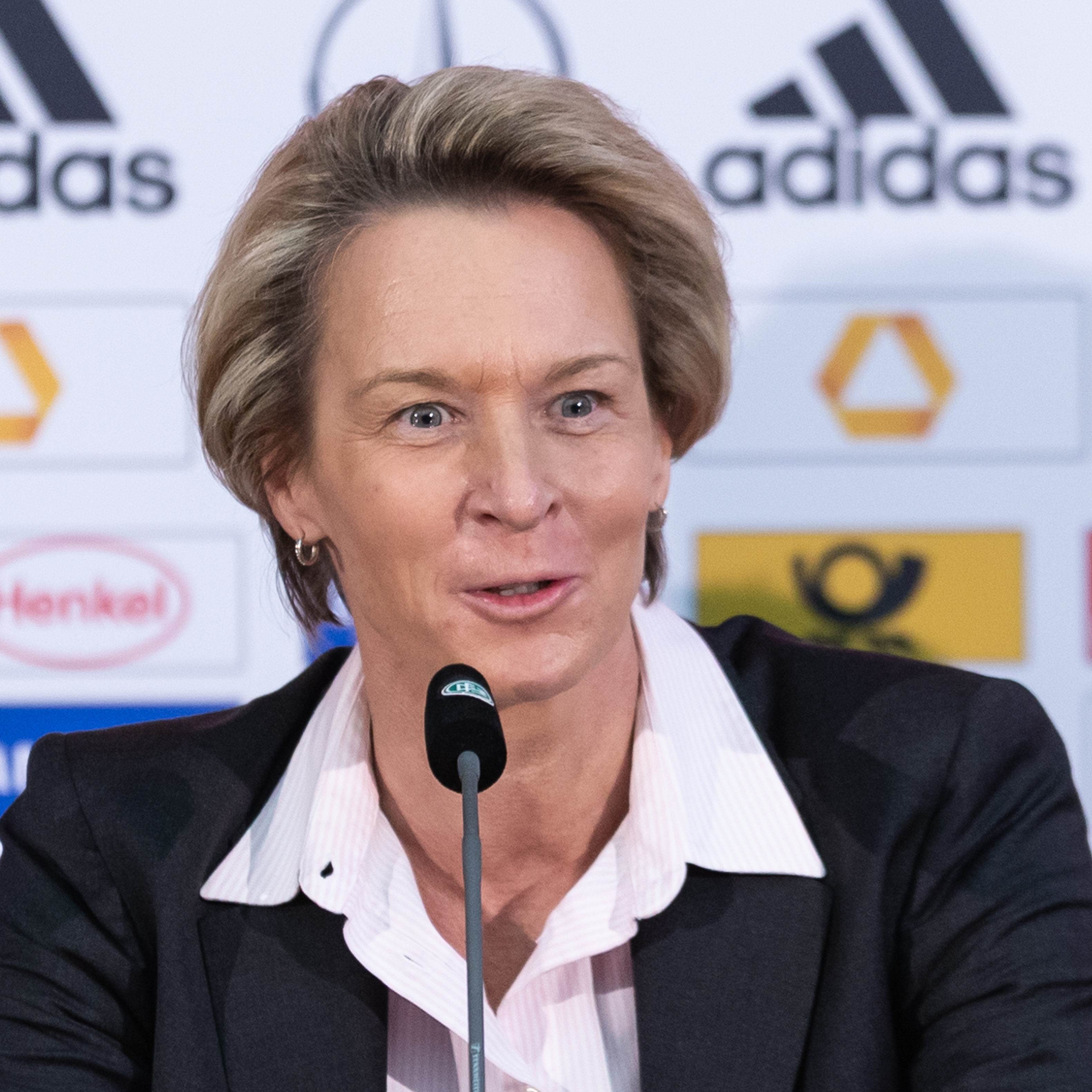 Martina Voss-Tecklenburg, Bundestrainerin der Frauen-Nationalmannschaft